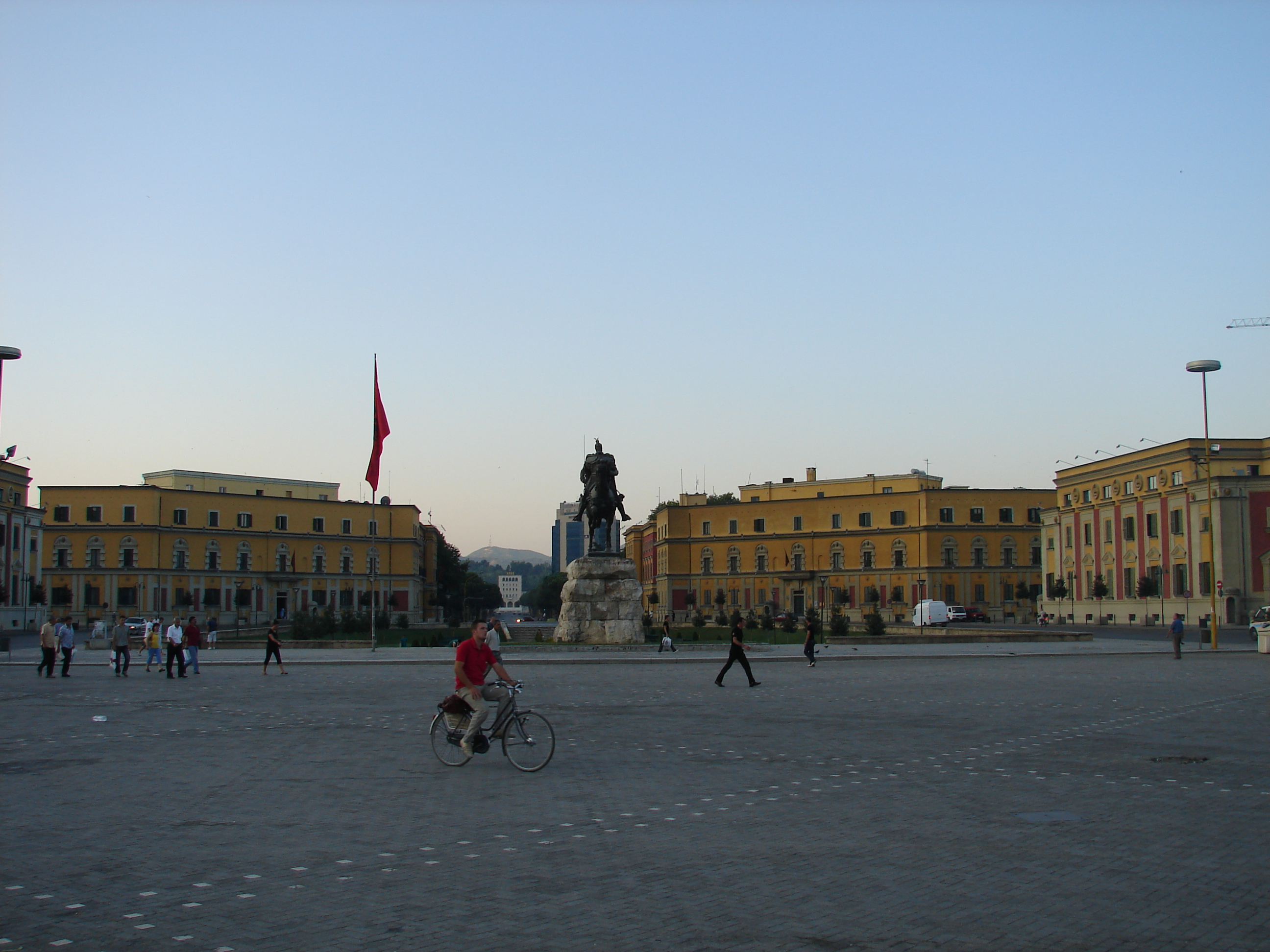 Skanderbeg Square in Tirana, Albania